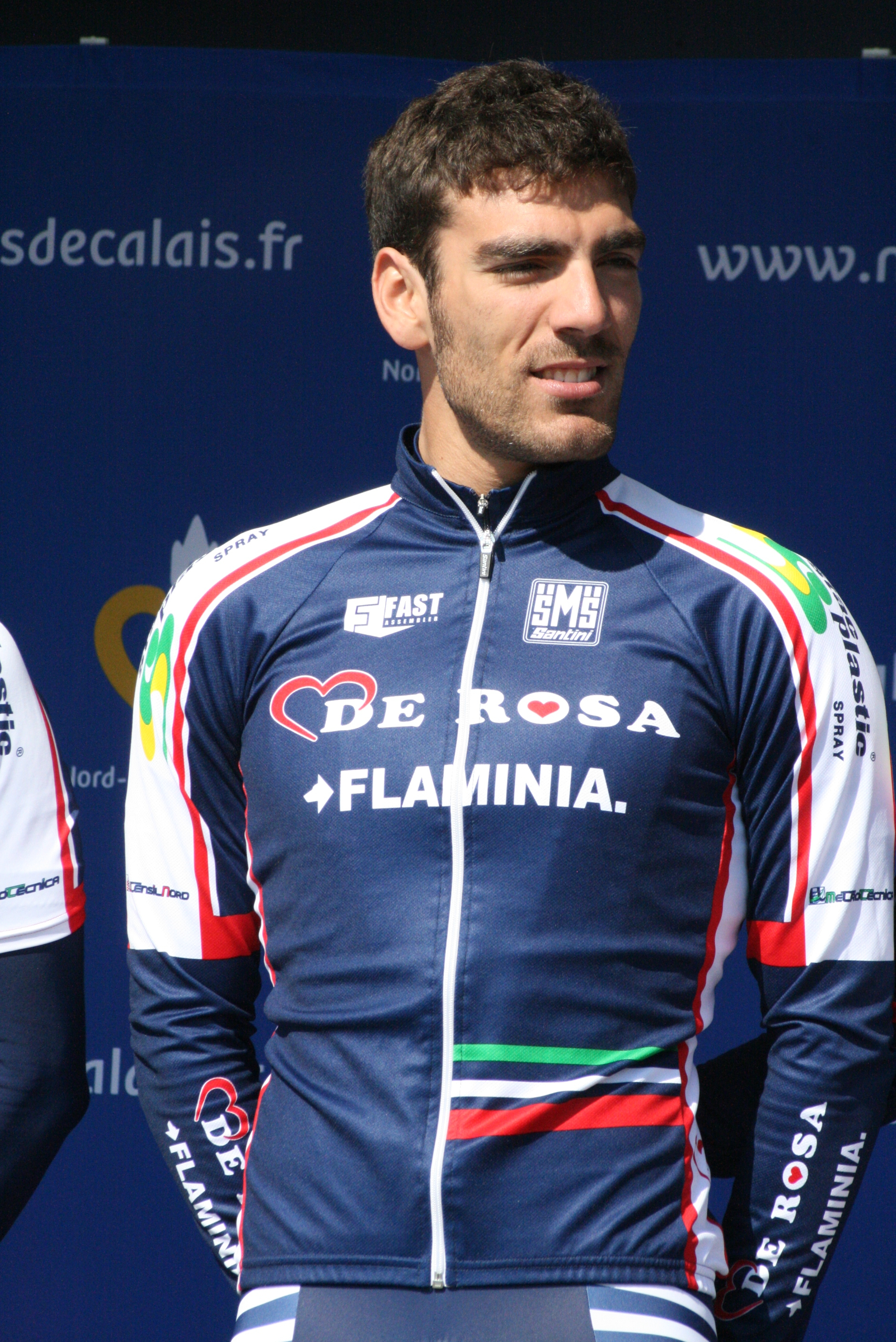 Présentation des coureurs au départ de la première étape Gianluca Maggiore